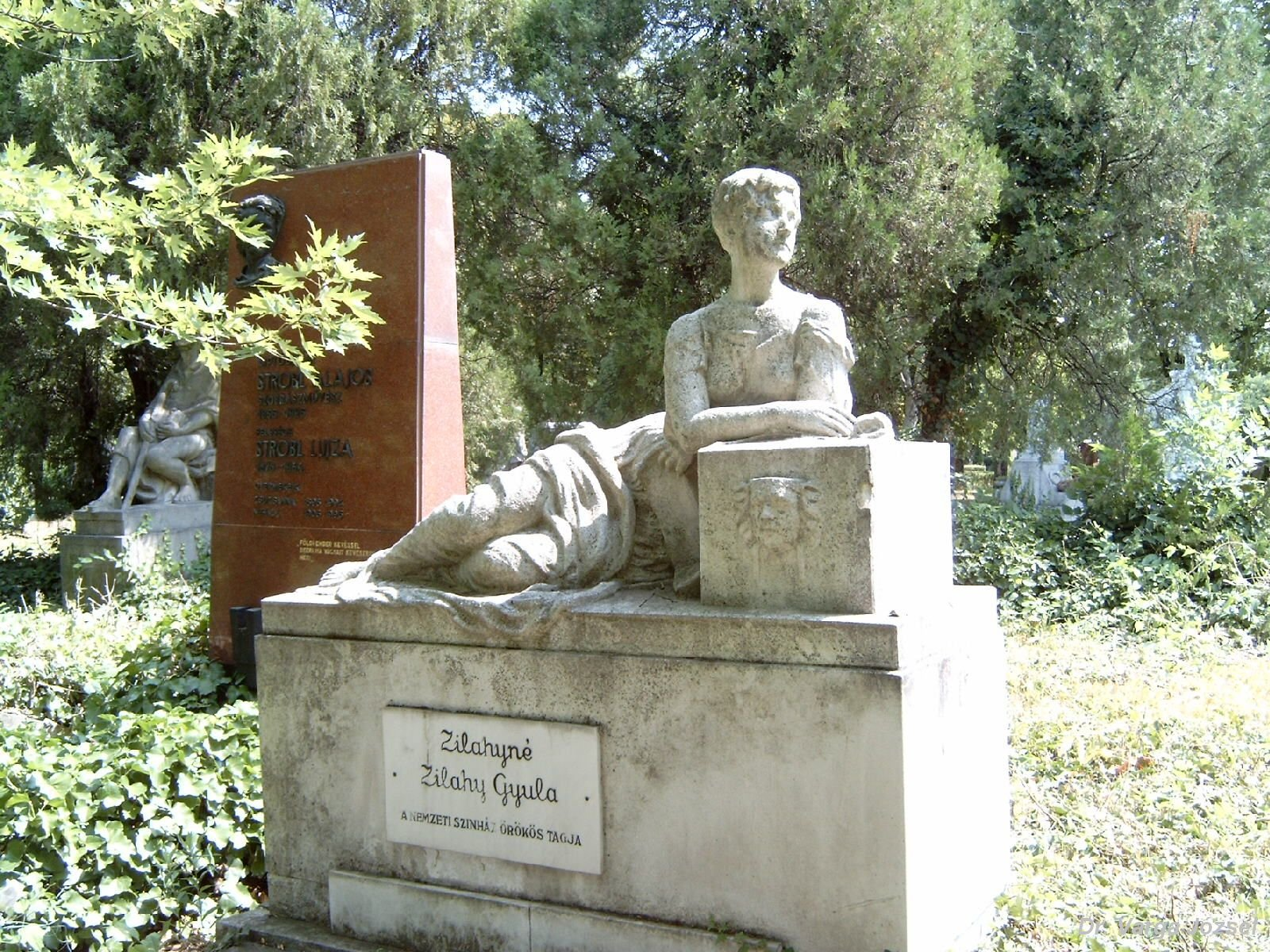 Zilahy Gyula, Balogh (Zilah, 1859. jan. 22. – Bp., 1938. máj. 16.): drámai színész, színigazgató sírja Budapesten. Kerepesi temető: 26/1-1-36 [szobrász: Kallós Ede].